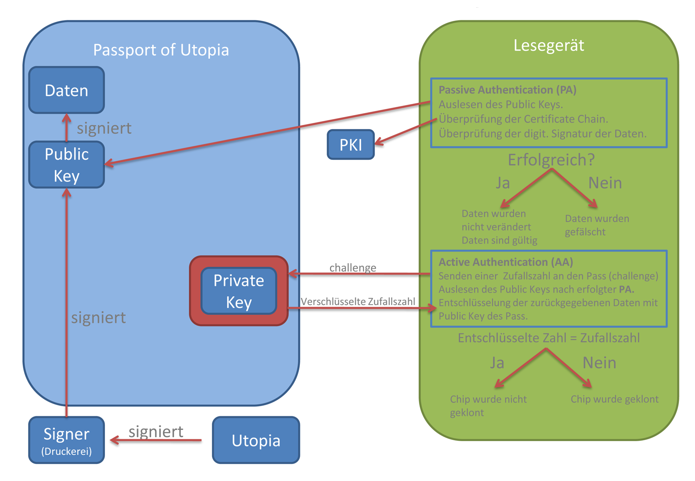 Sicherheitsmechanismen beim elektronischen Reisepass.